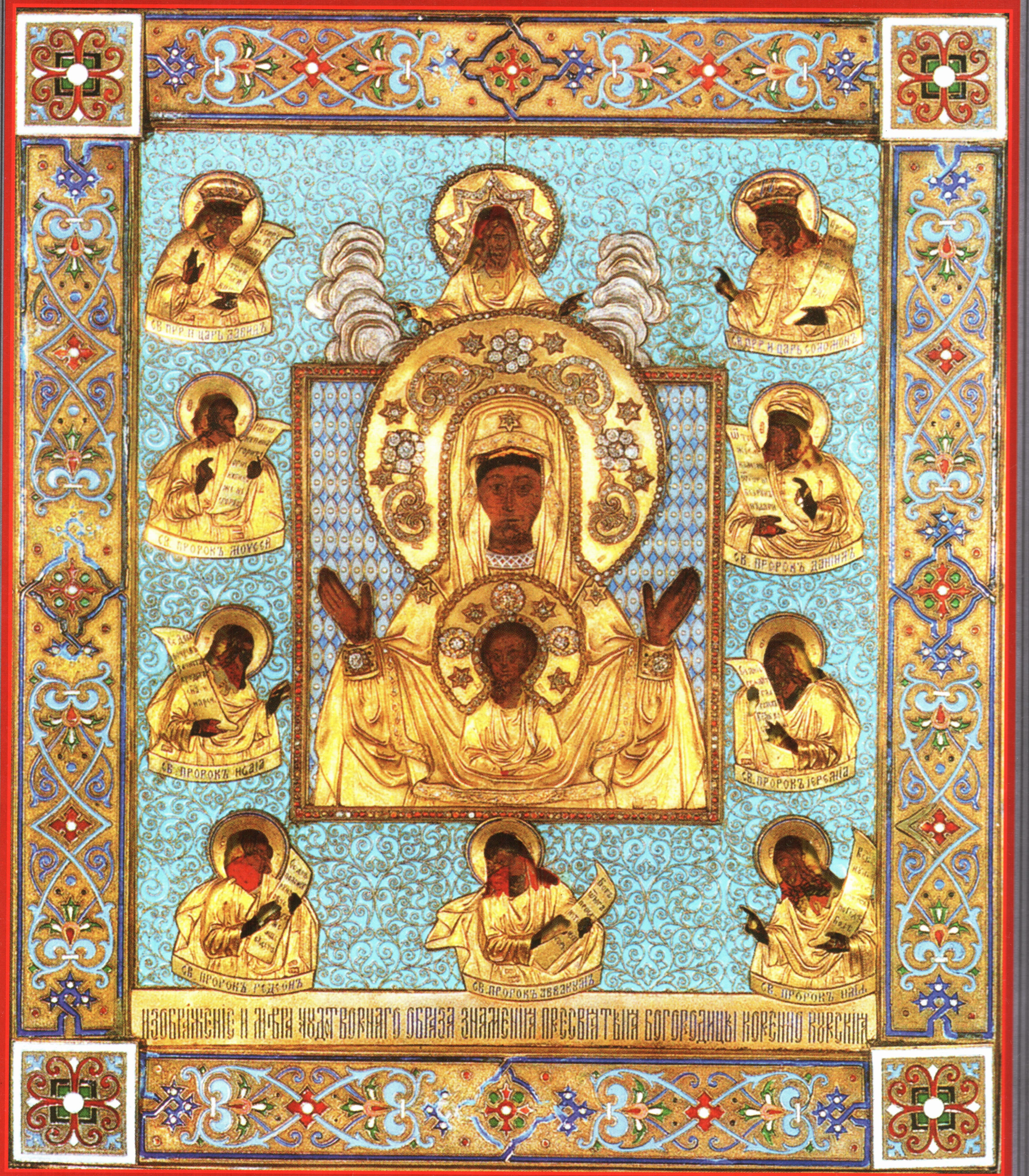 Икона Божией Матери «Курская Коренная»